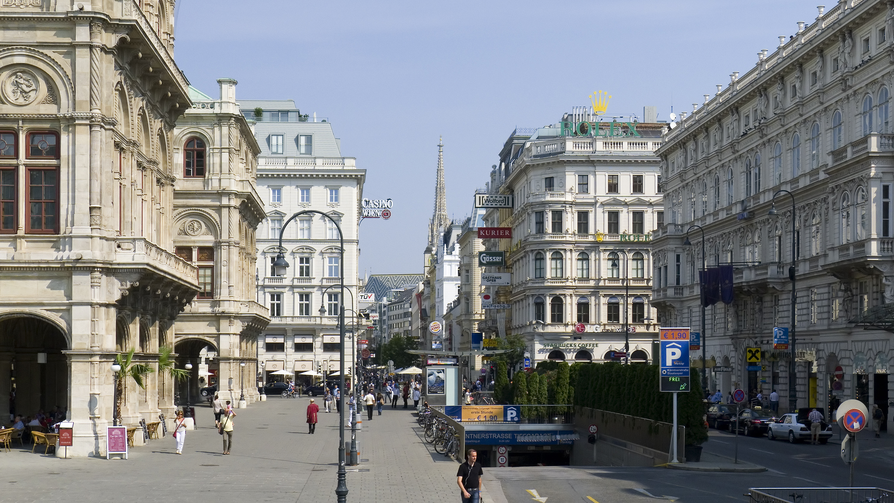 Kärntner Straße in Wien 1 bei der Staatsoper Richtung Norden